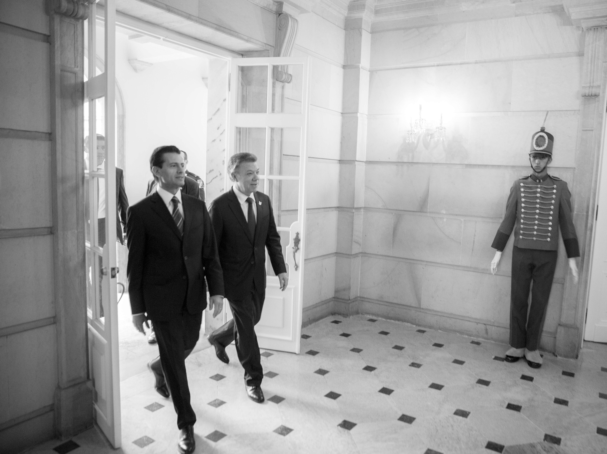 Visita de Estado del presidente mexicano Enrique Peña Nieto a Colombia donde lo recibe el presidente colombiano Juan Manuel Santos el 27 de octubre del 2016.